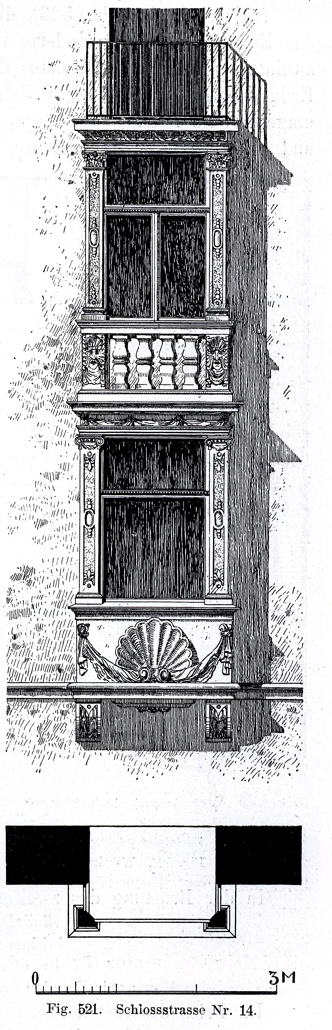 Dresden, Schlosstraße 14, Erker